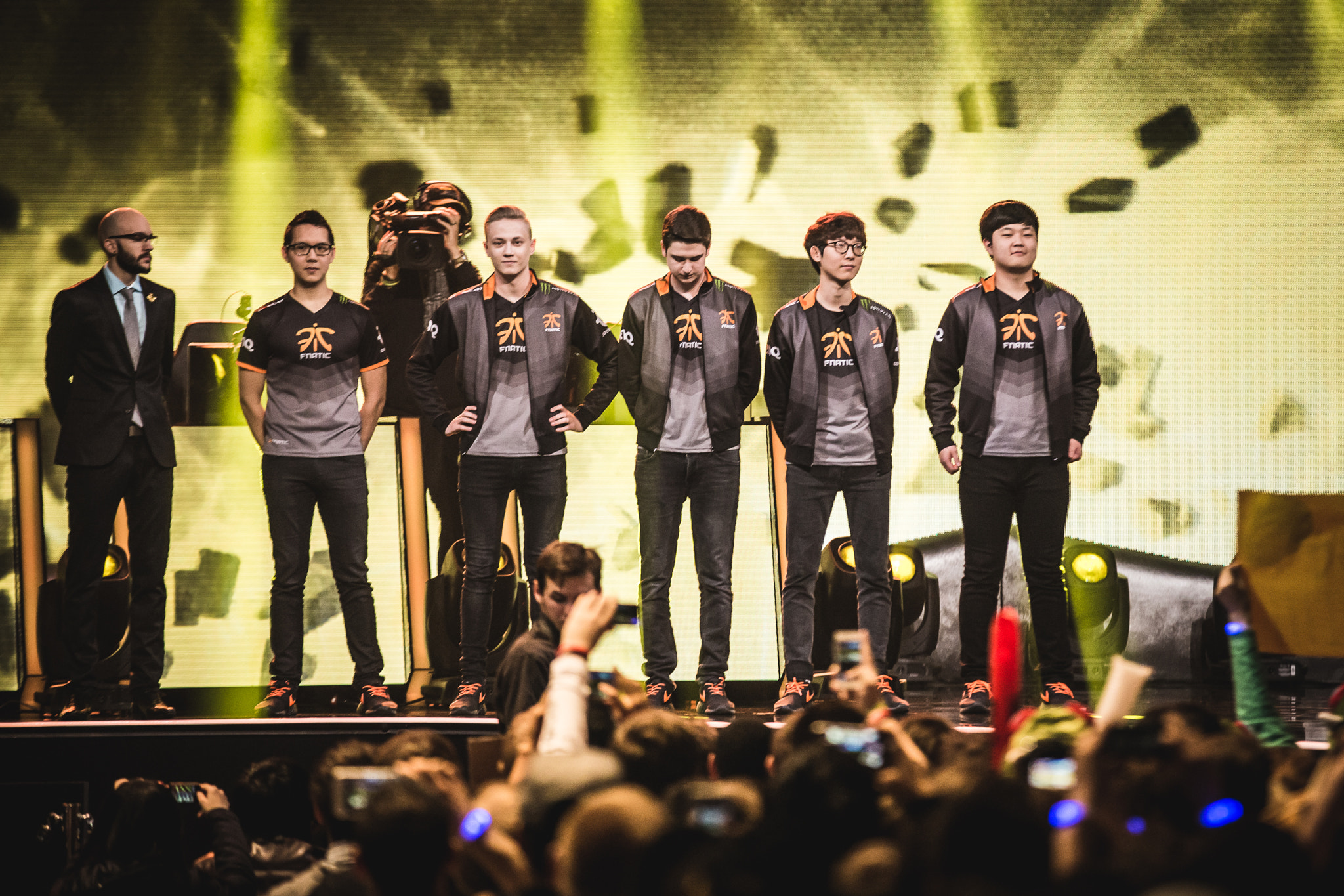 500px provided description: 1cun1849 Jpg [#lol ,#London ,#S5 ,#teamchina]